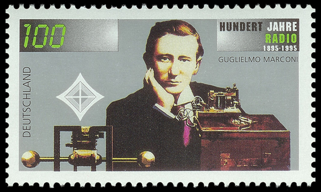 Briefmarke der Deutschen Post AG aus dem Jahre 1995, 100 Jahre Radio